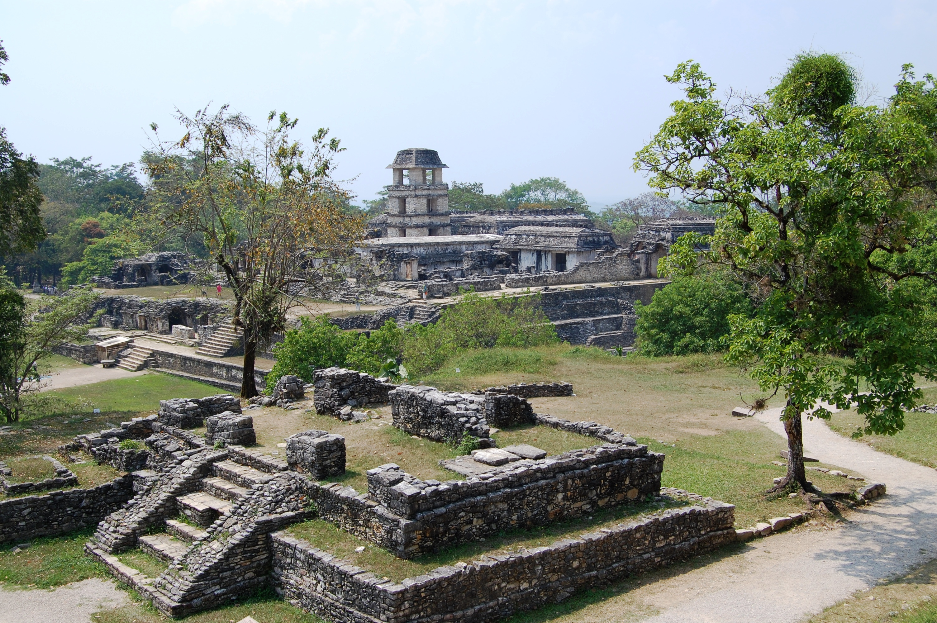 Palenque, Mexico